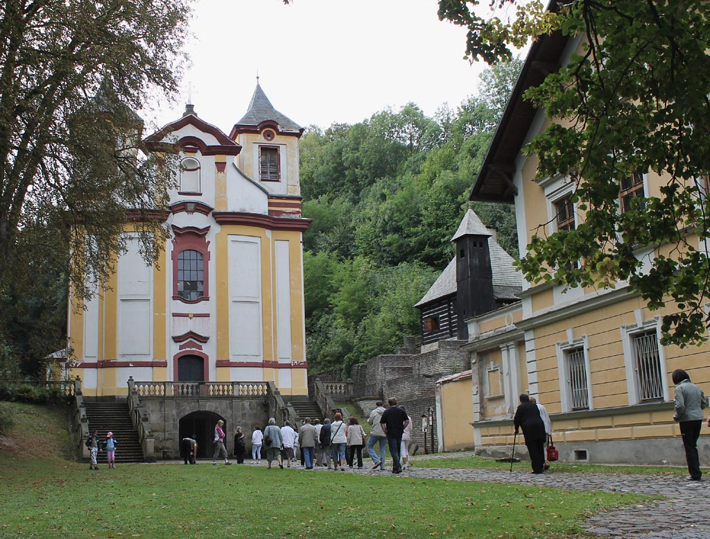 Kostel svatého Mikuláše, Svatý Mikuláš (Vraclav).